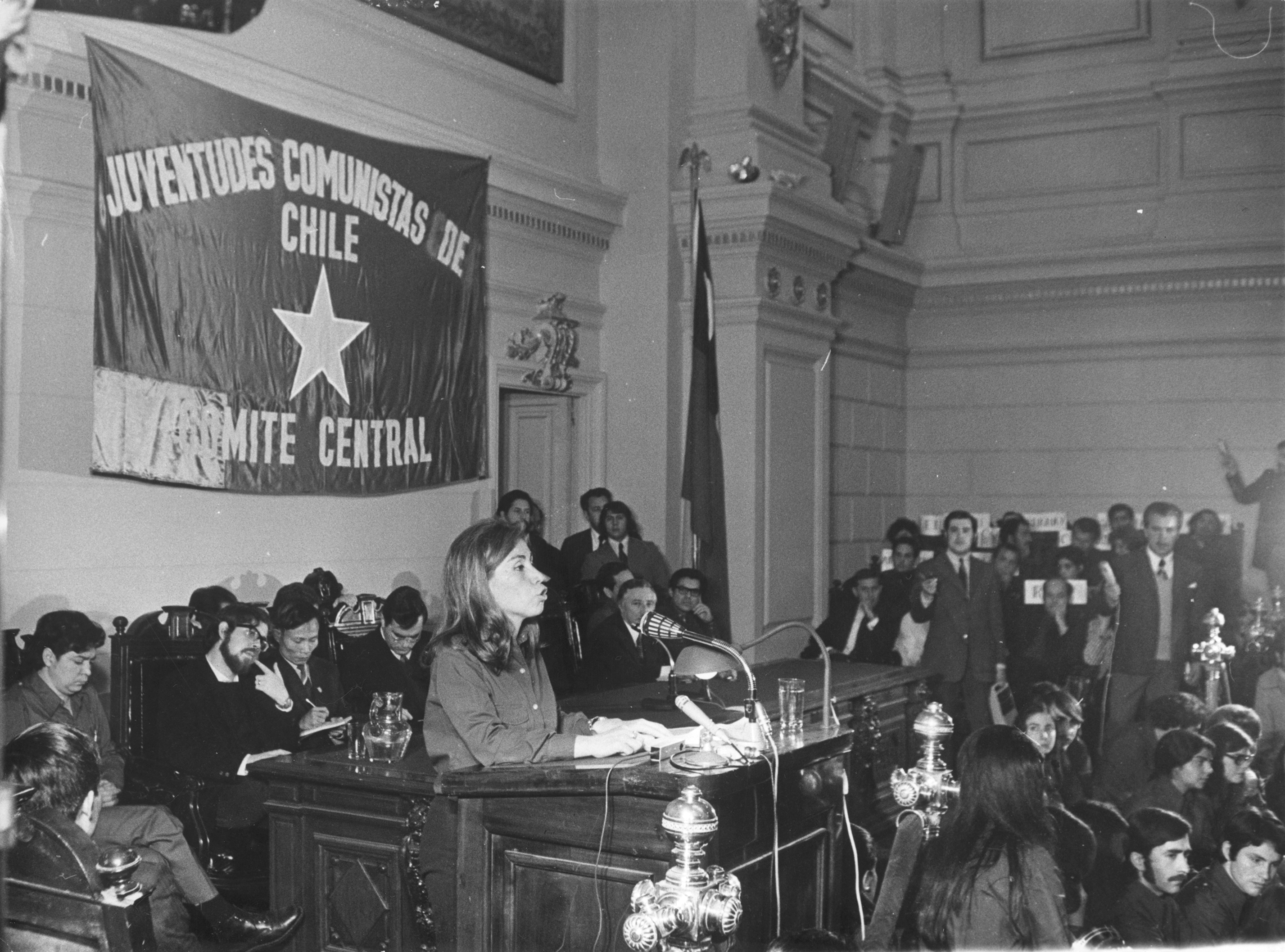 Discurso de Gladys Marín en un congreso de las Juventudes Comunistas